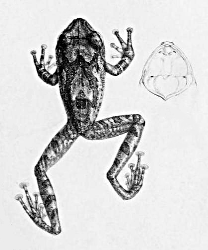 Pseudophilautus nanus